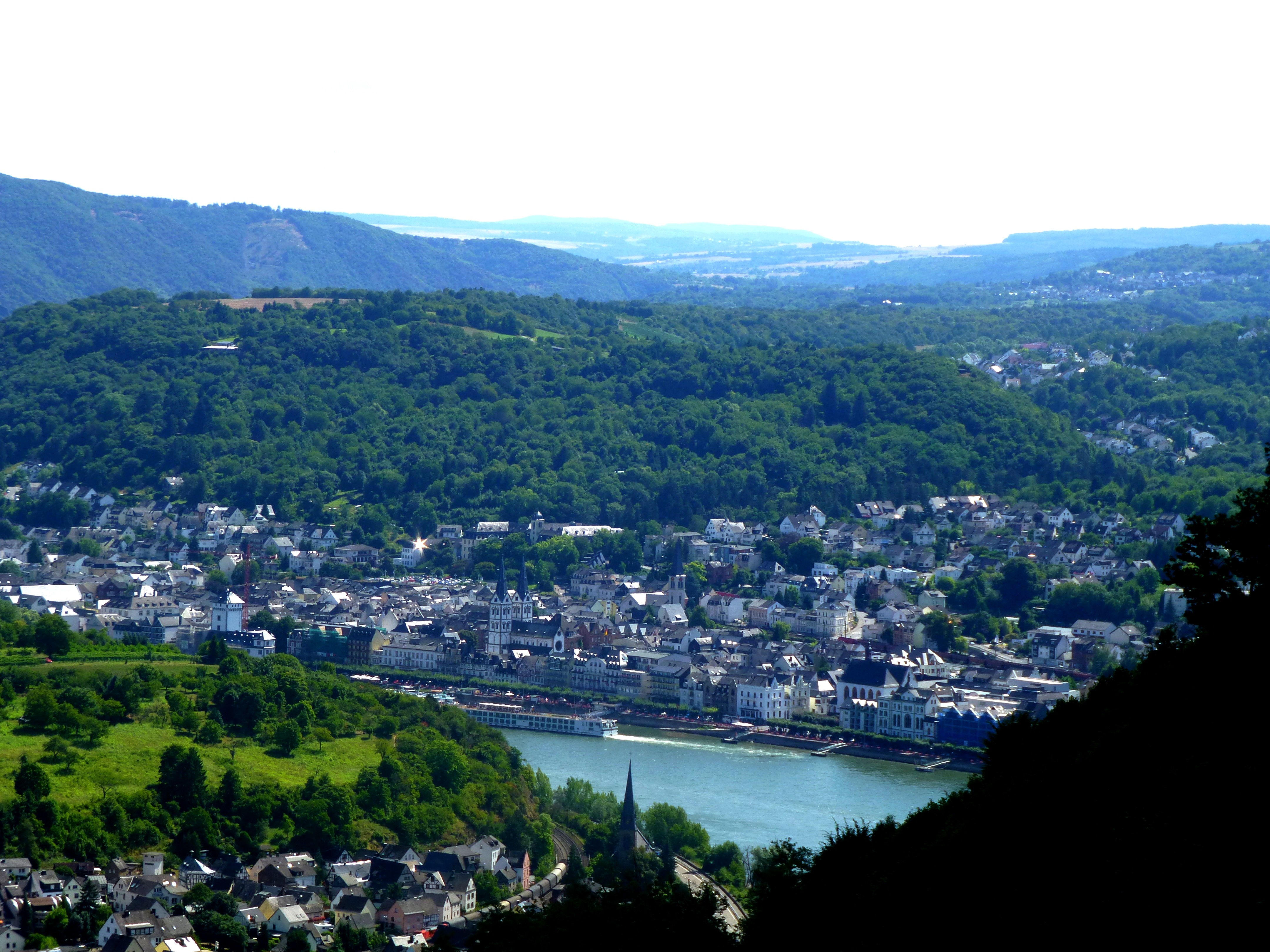 Boppard vom Café-Restaurant Vierseenblick aus gesehen